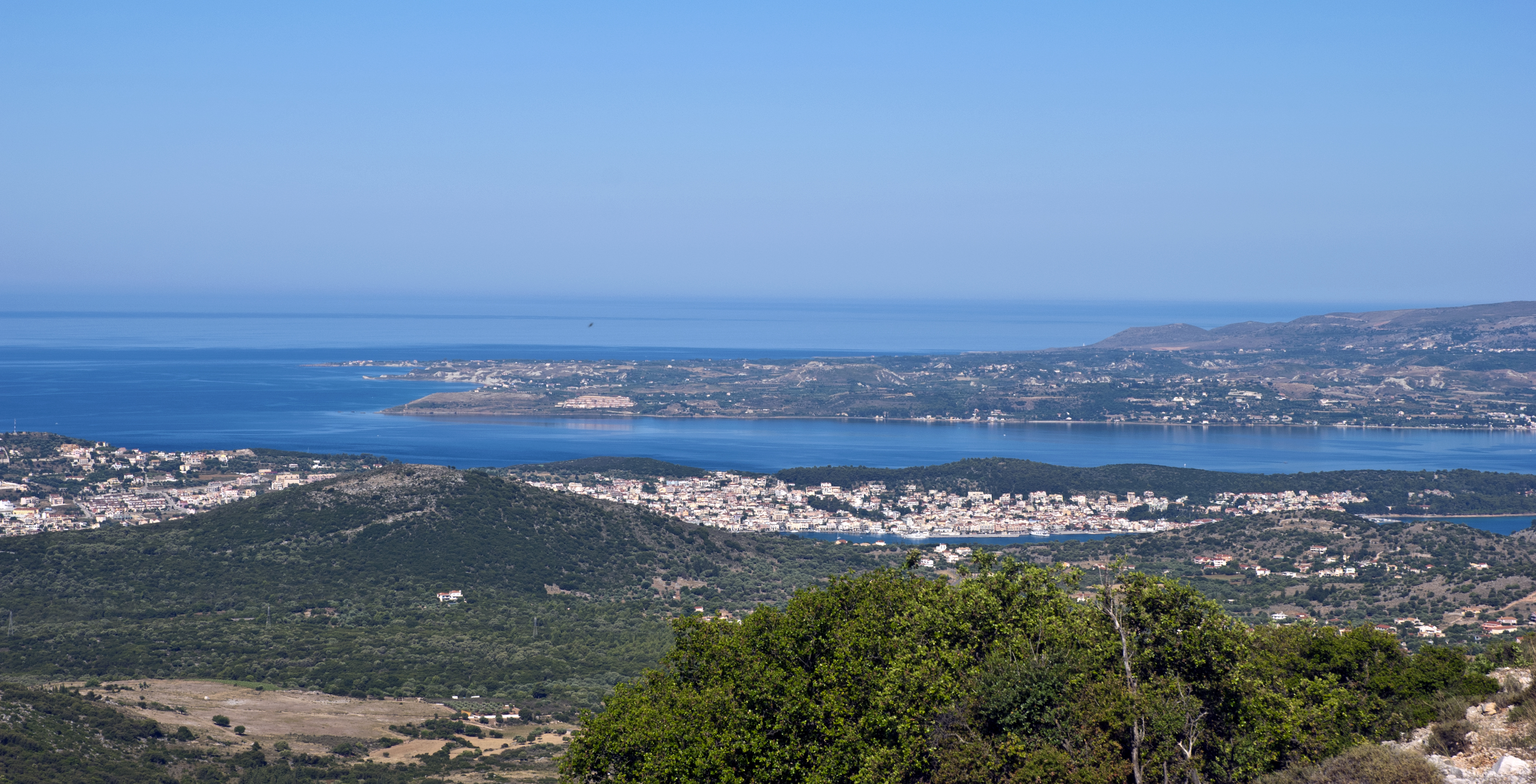 Kefalonia